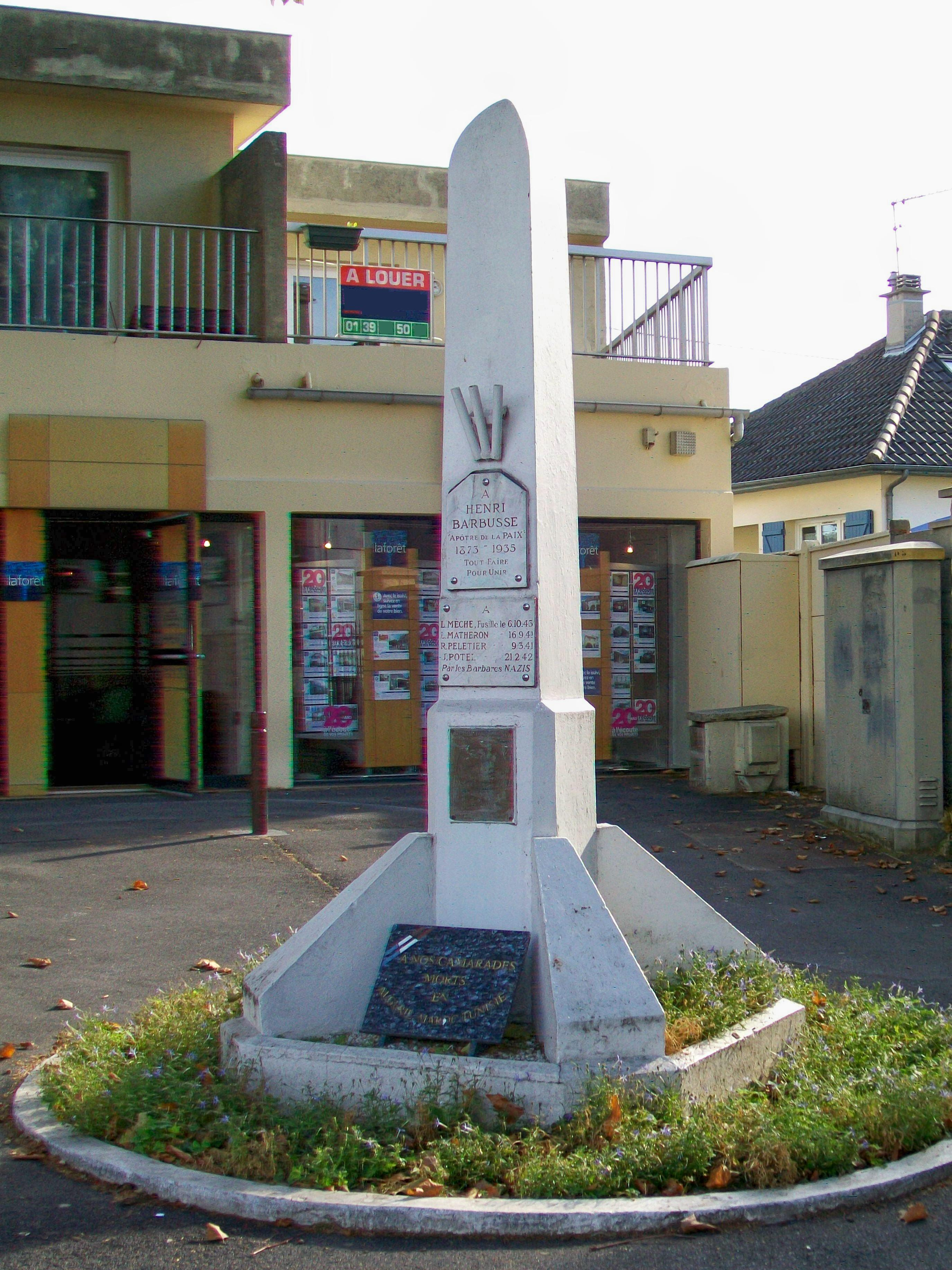 Monument pour Henri Barbussse, place de la Charmeuse à Goussainville (95). Il commémore également les victimes de l'occcupation allemande et de la Résistance.